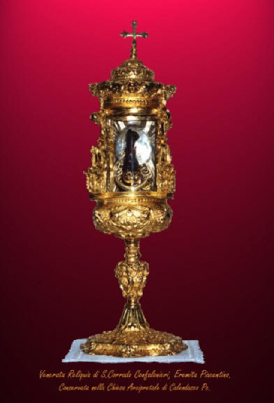 Reliquia di san Corrado conservata a Calendasco ove è Patrono. La foto è usabile per divulgare la devozione al Santo piacentino.